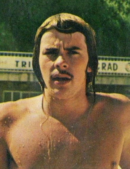 SPORT VEDETTES-PANINI 1974-Figurina n.189- WILKIE - GRAN BRETAGNA -NUOTO-Rec